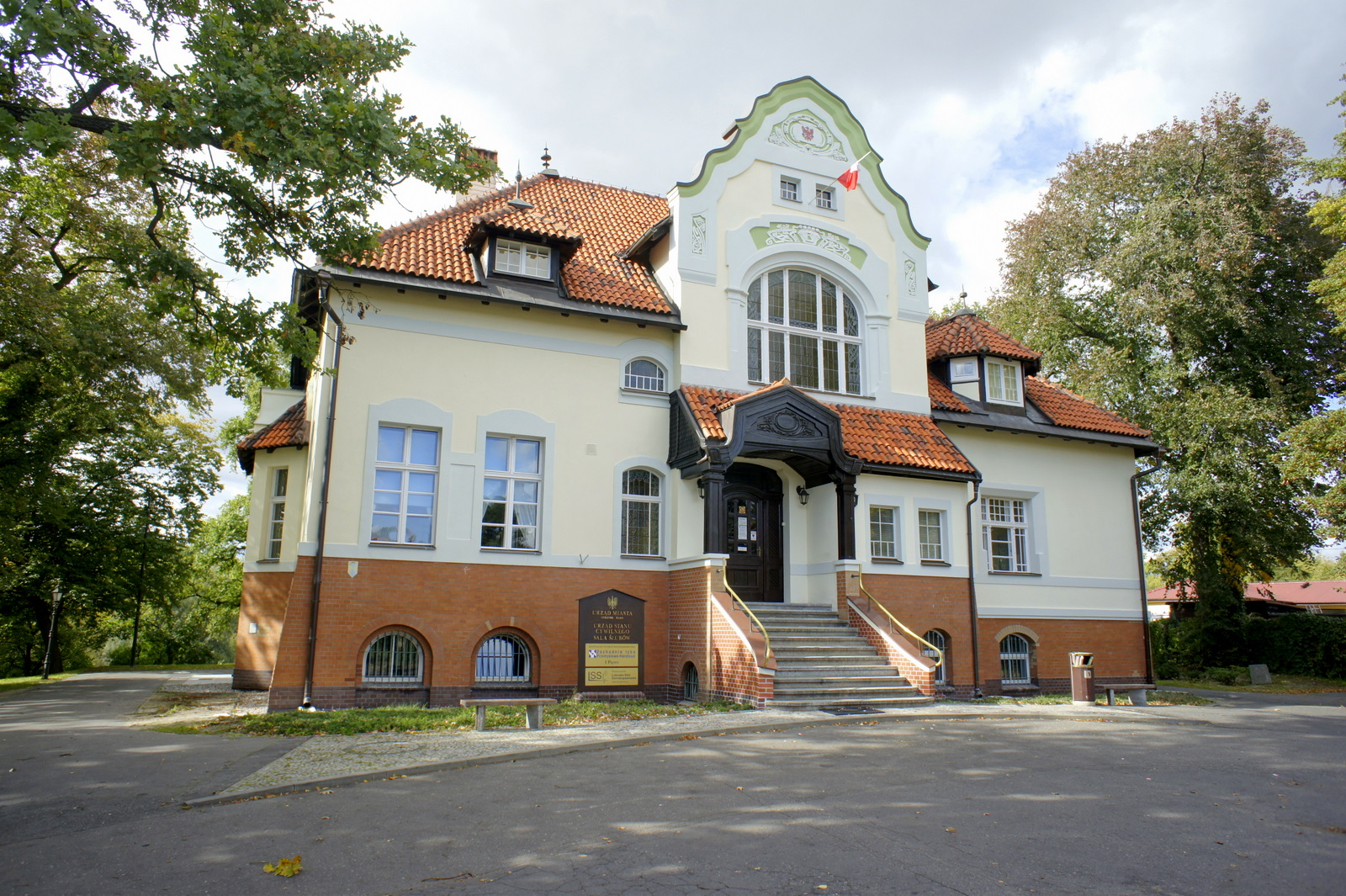 Gorzów Wielkopolski, ul. Kazimierza Wielkiego 1. Podmiejska rezydencja Karla Bahra z lat 1902-1903, elewacja frontowa (zabytek nr 439/97)